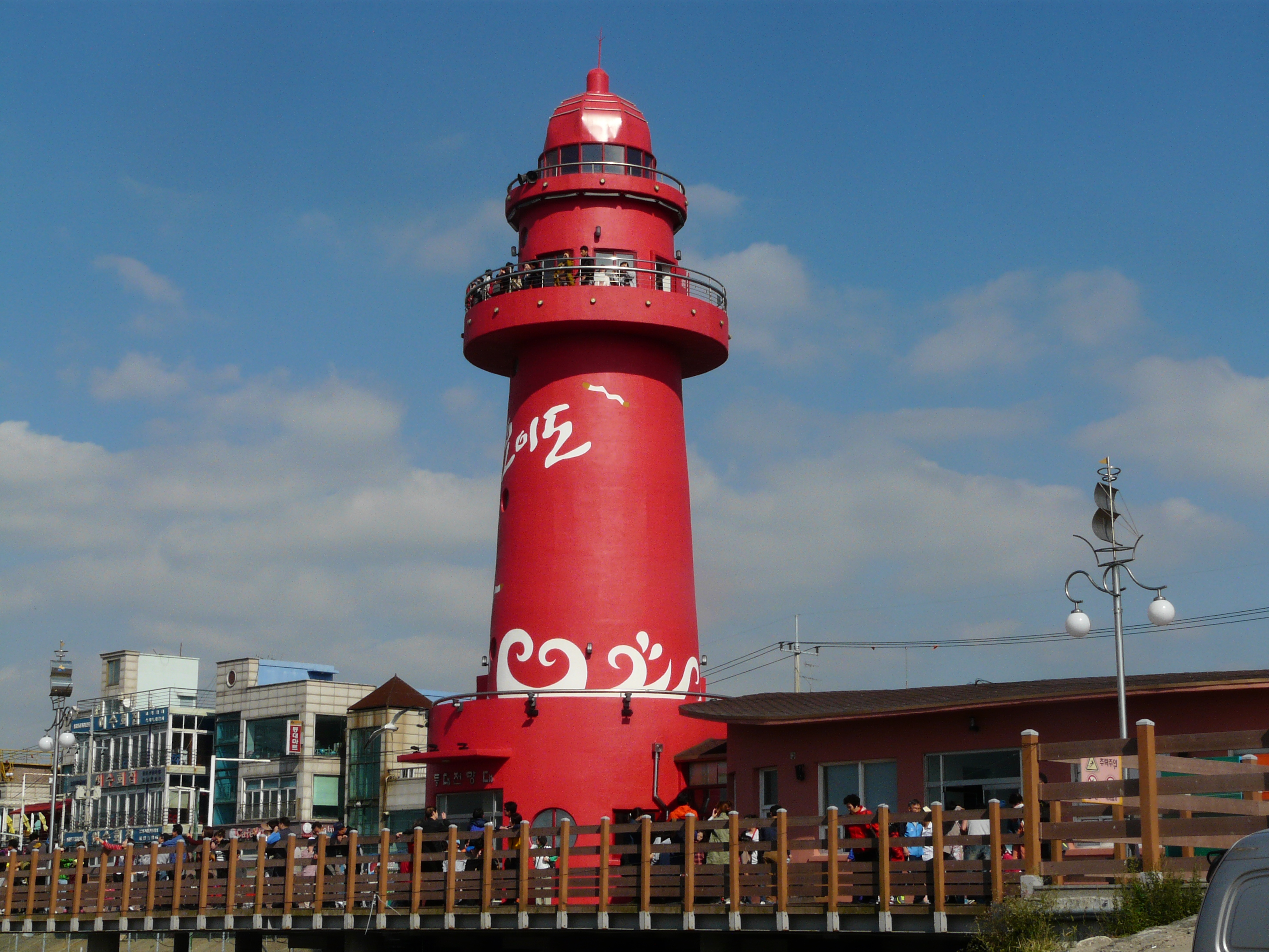 Siheung, October 2014